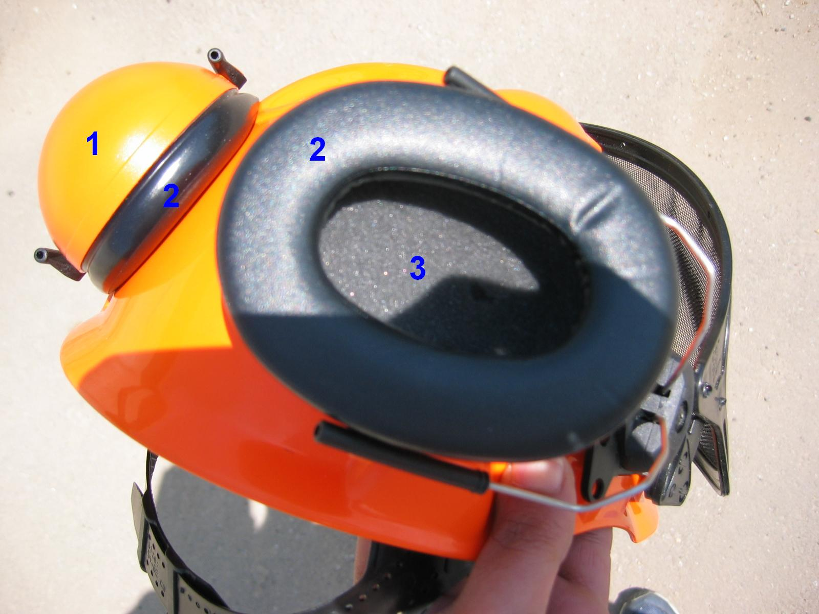 Слухов протектор Peltor, монтиран на предпазна каска